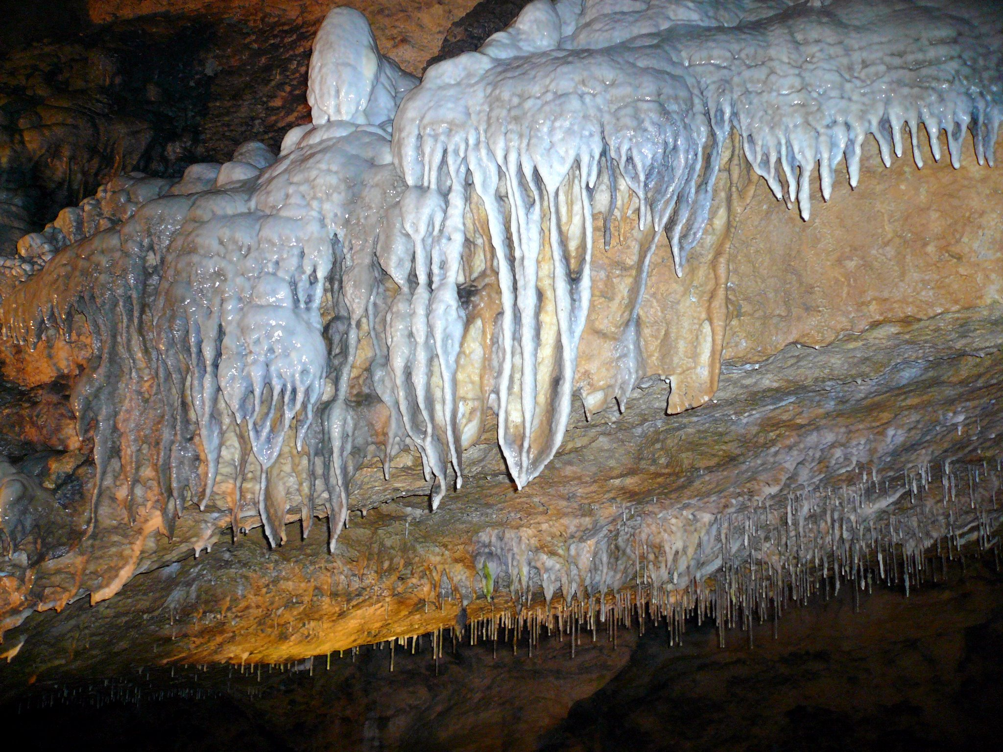 Sophienhöhle, Deckenformationen